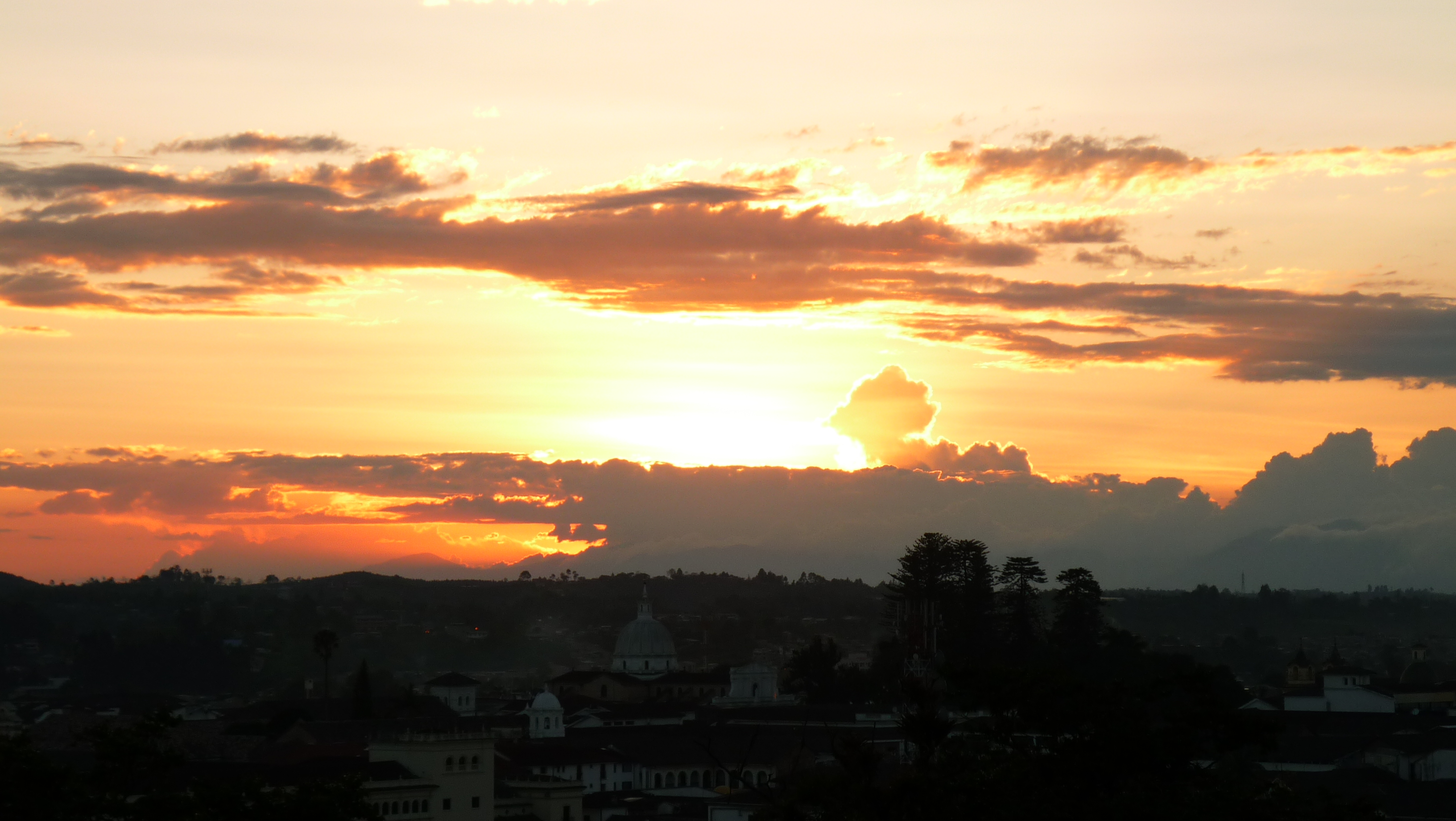 Atardecer en Popayán